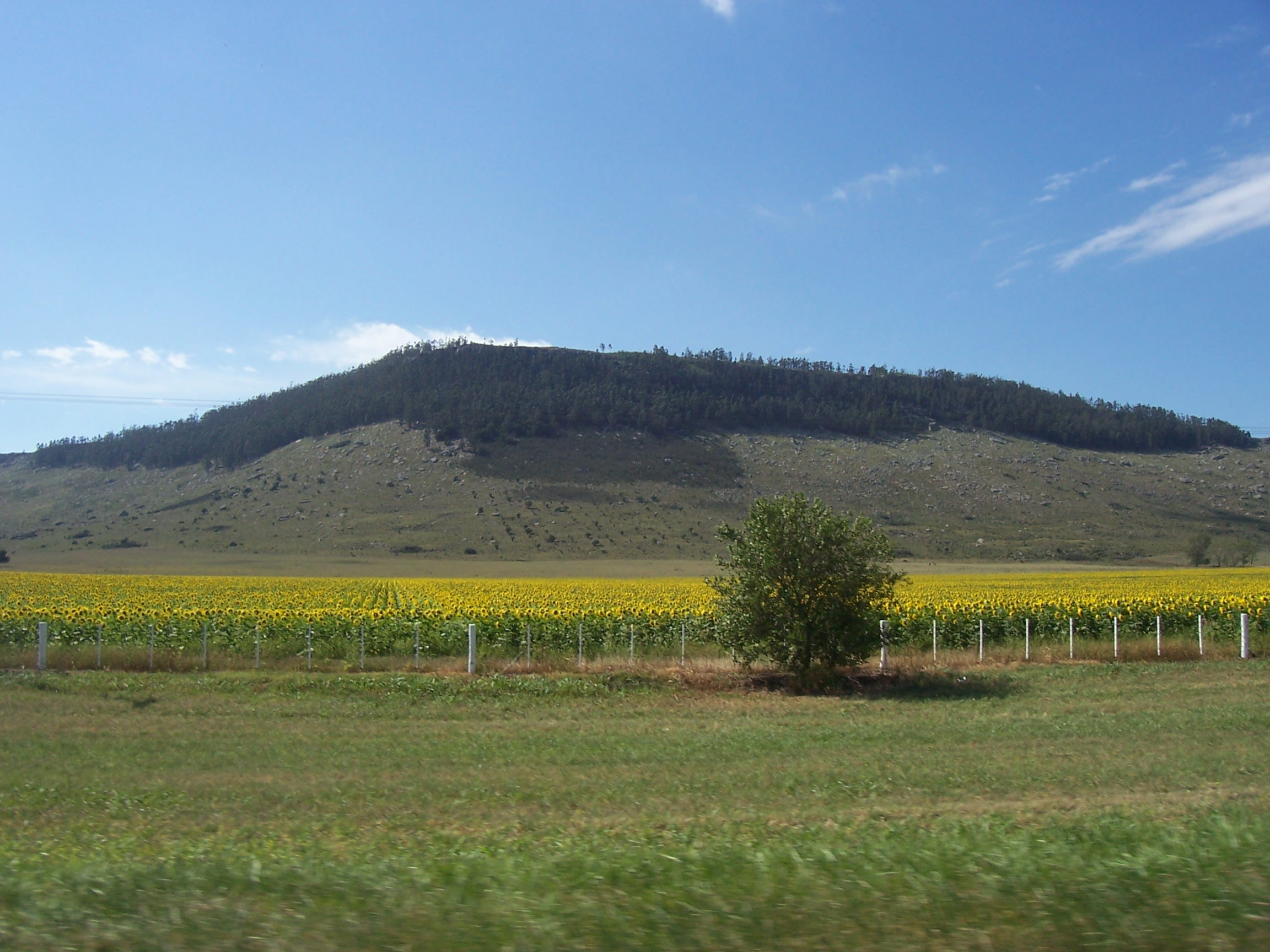 Las sierras de la ciudad de Balcarce en Buenos Aires, Argentina.